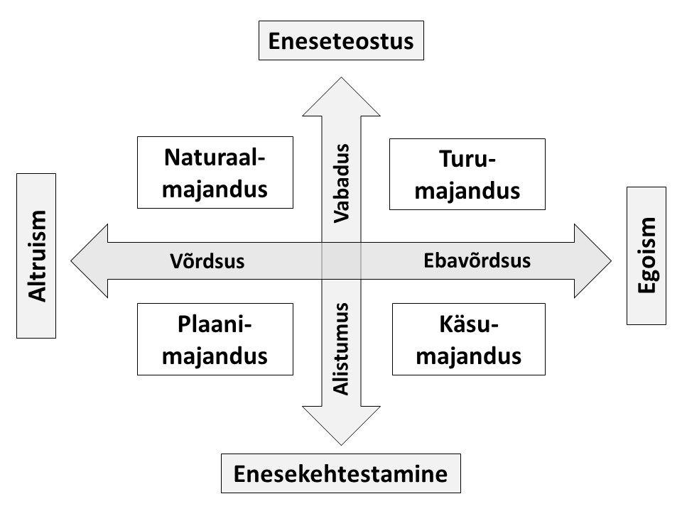 Majandussüsteemid kaheteljelises poliitikakäsitluses